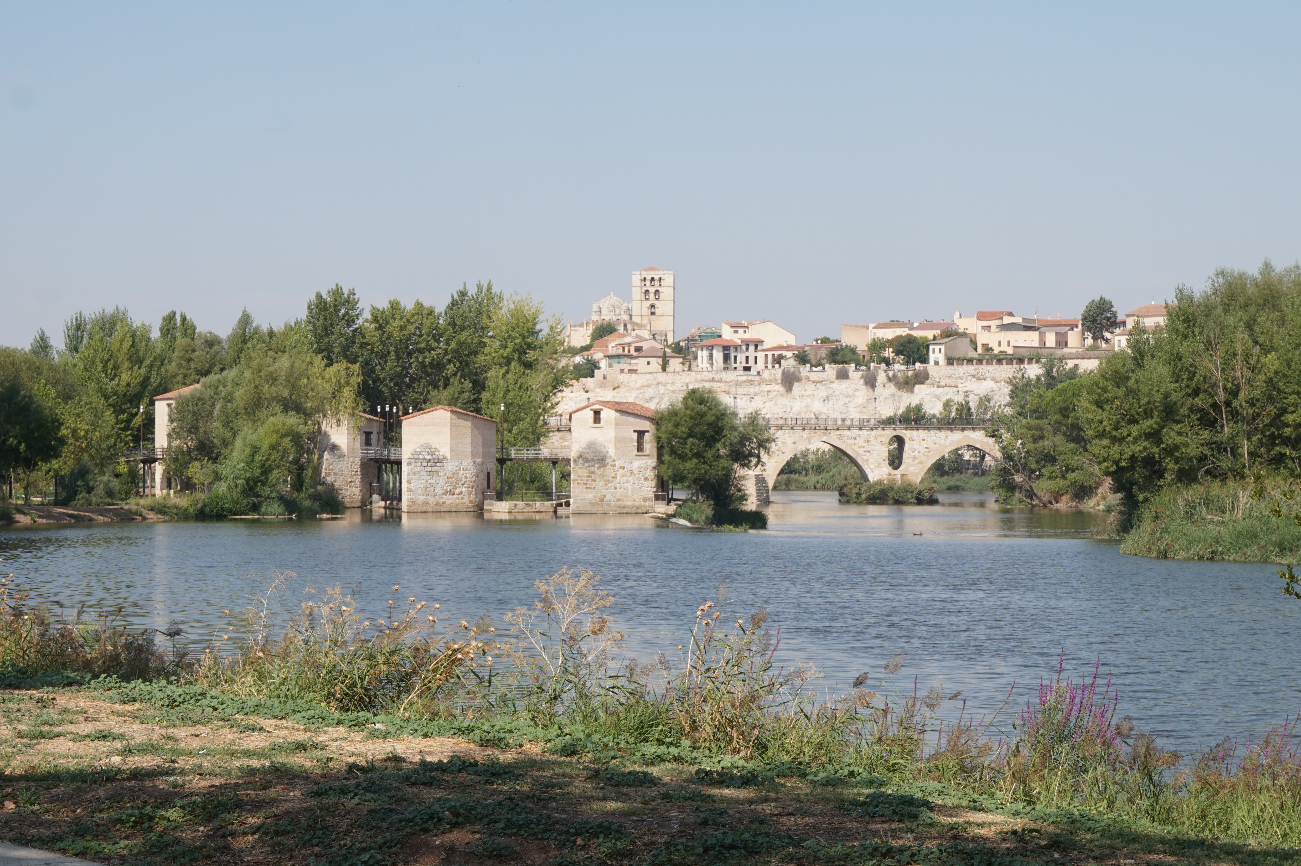 Aceñas de Cabañales - Panorámica de la ciudad de Zamora